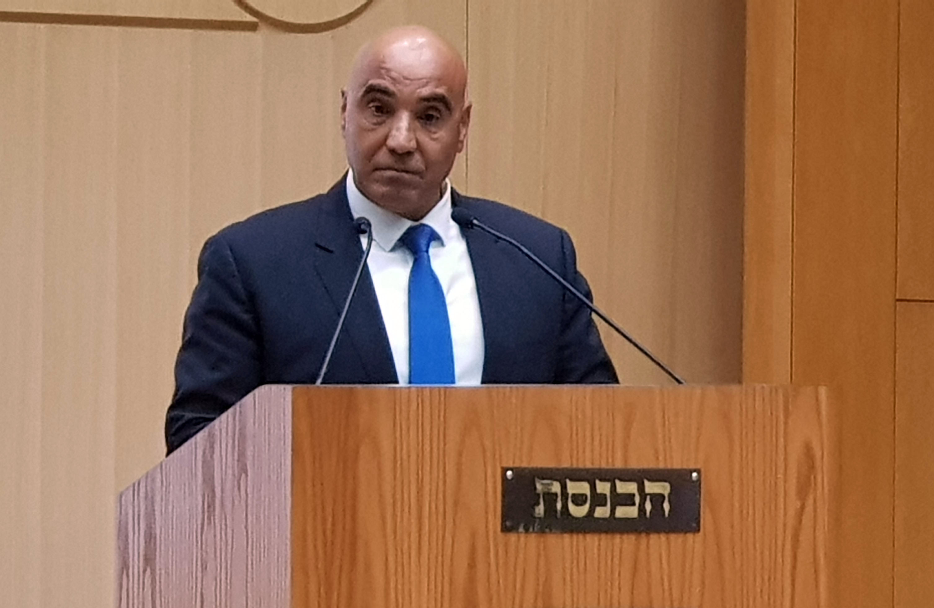 סגן יושב ראש הכנסת ויושב ראש השדולה למאבק בתאונות הדרכים, חבר הכנסת חמד עמאר, נואם באודיטוריום הכנסת, נובמבר 2018